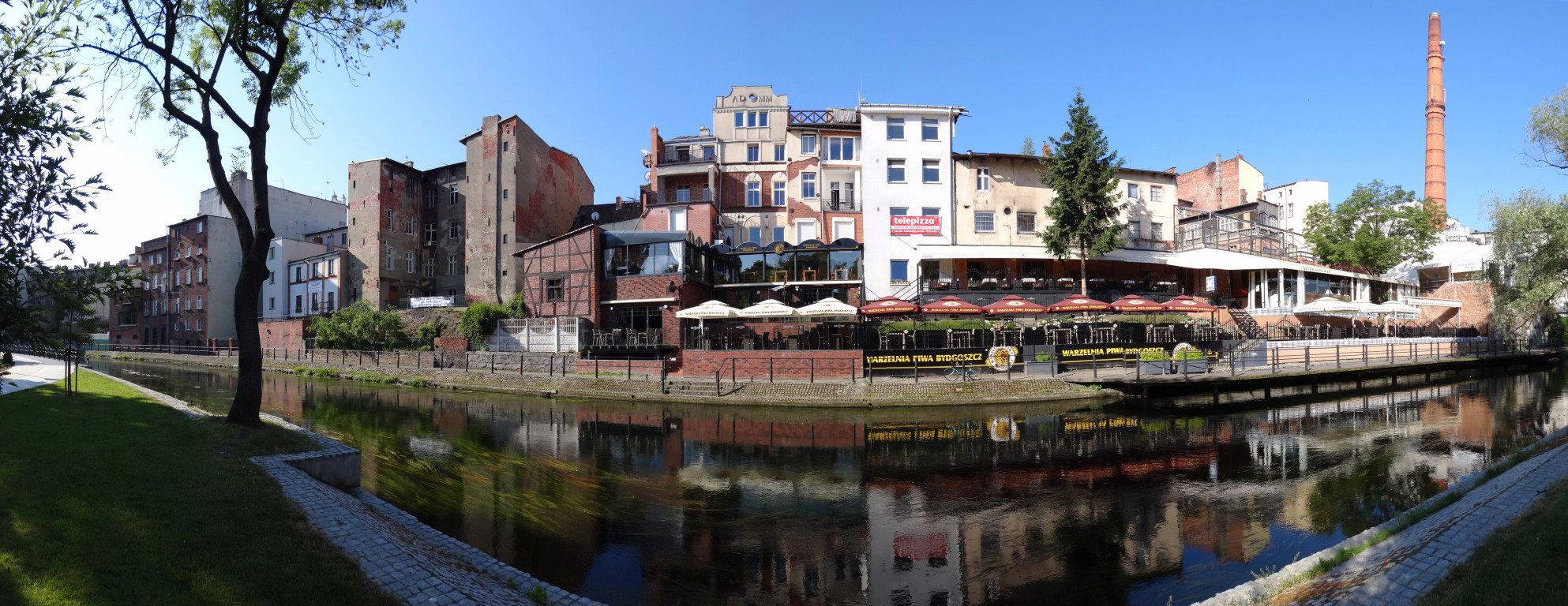 Ciąg kamienic nad Młynówką zwany Wenecją Bydgoską w sąsiedztwie Wyspy Młyńskiej w Bydgoszczy